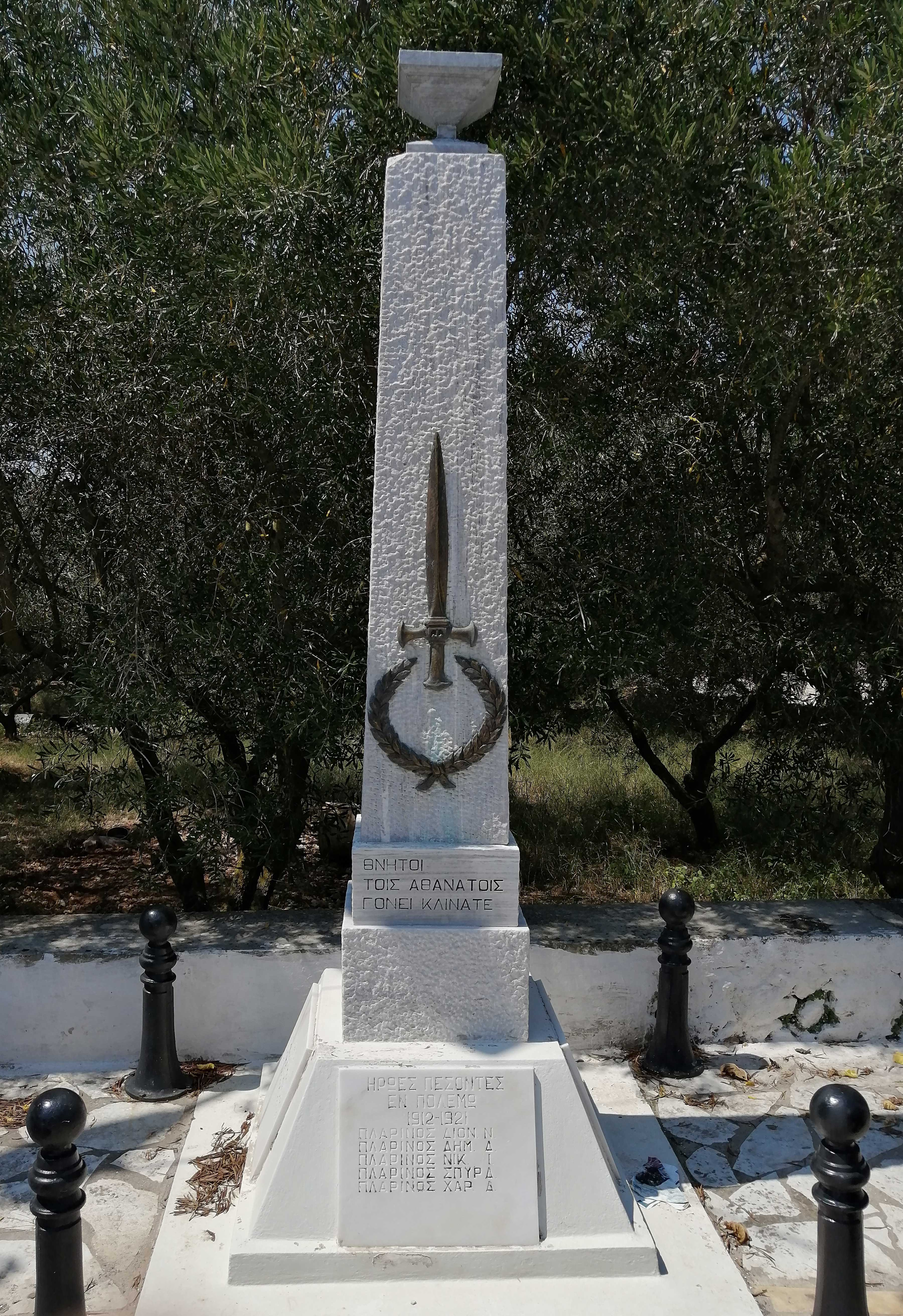 Μνημείο Ηρώων Ορθονιών